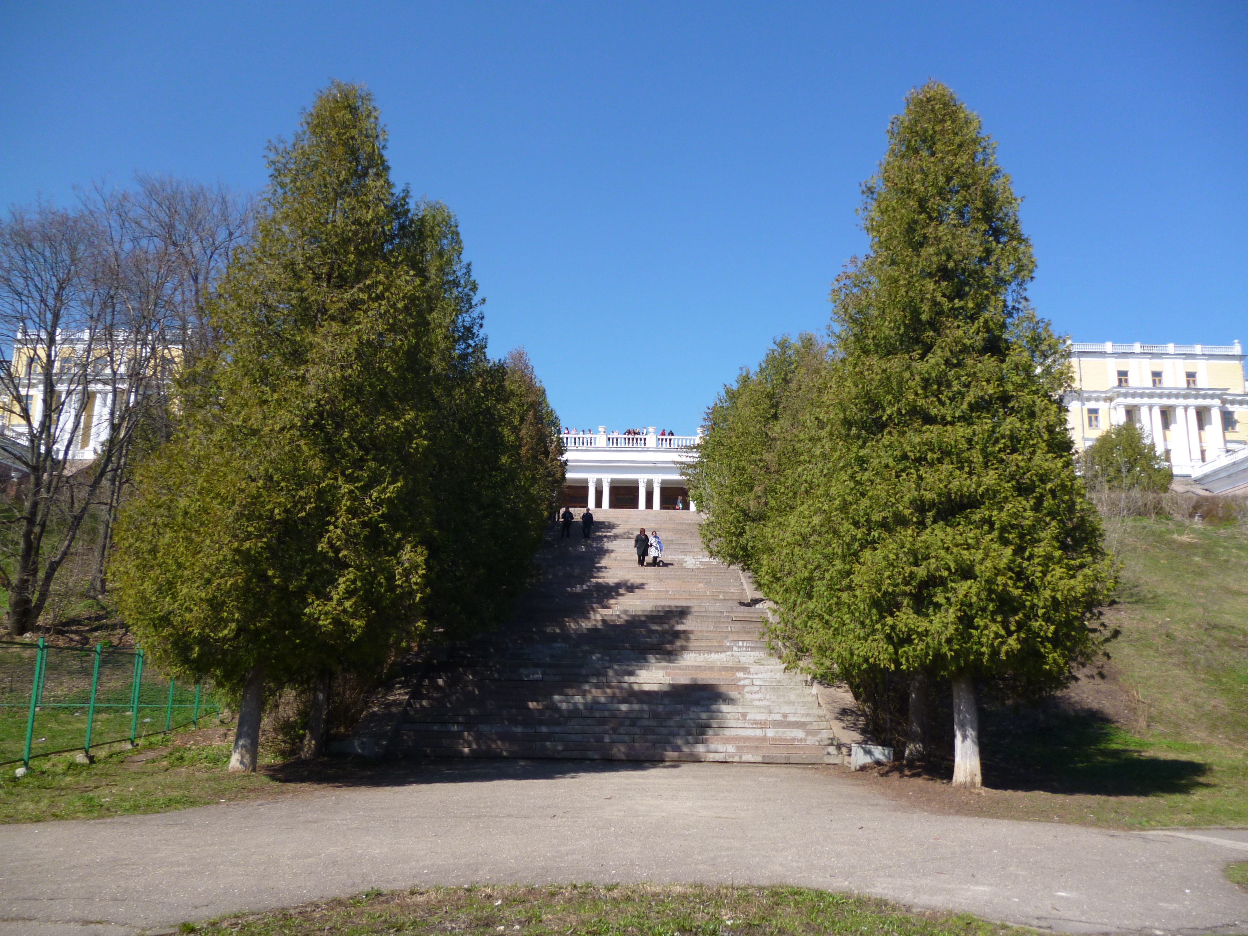 Корпуса санаторные (два): Архангельское, Красногорский район, Московская область